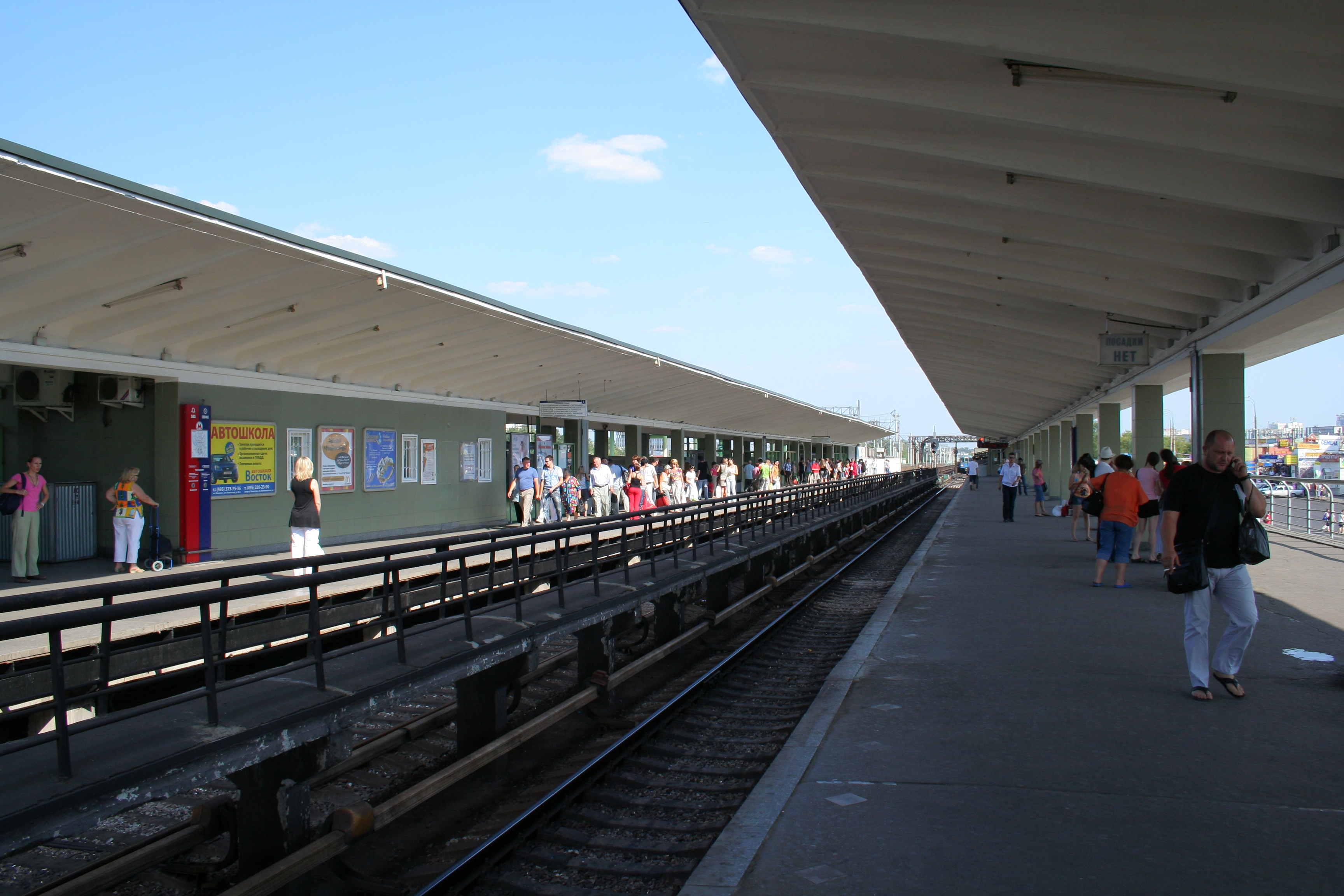 U-Bahnhof Wychino der Metro Moskau